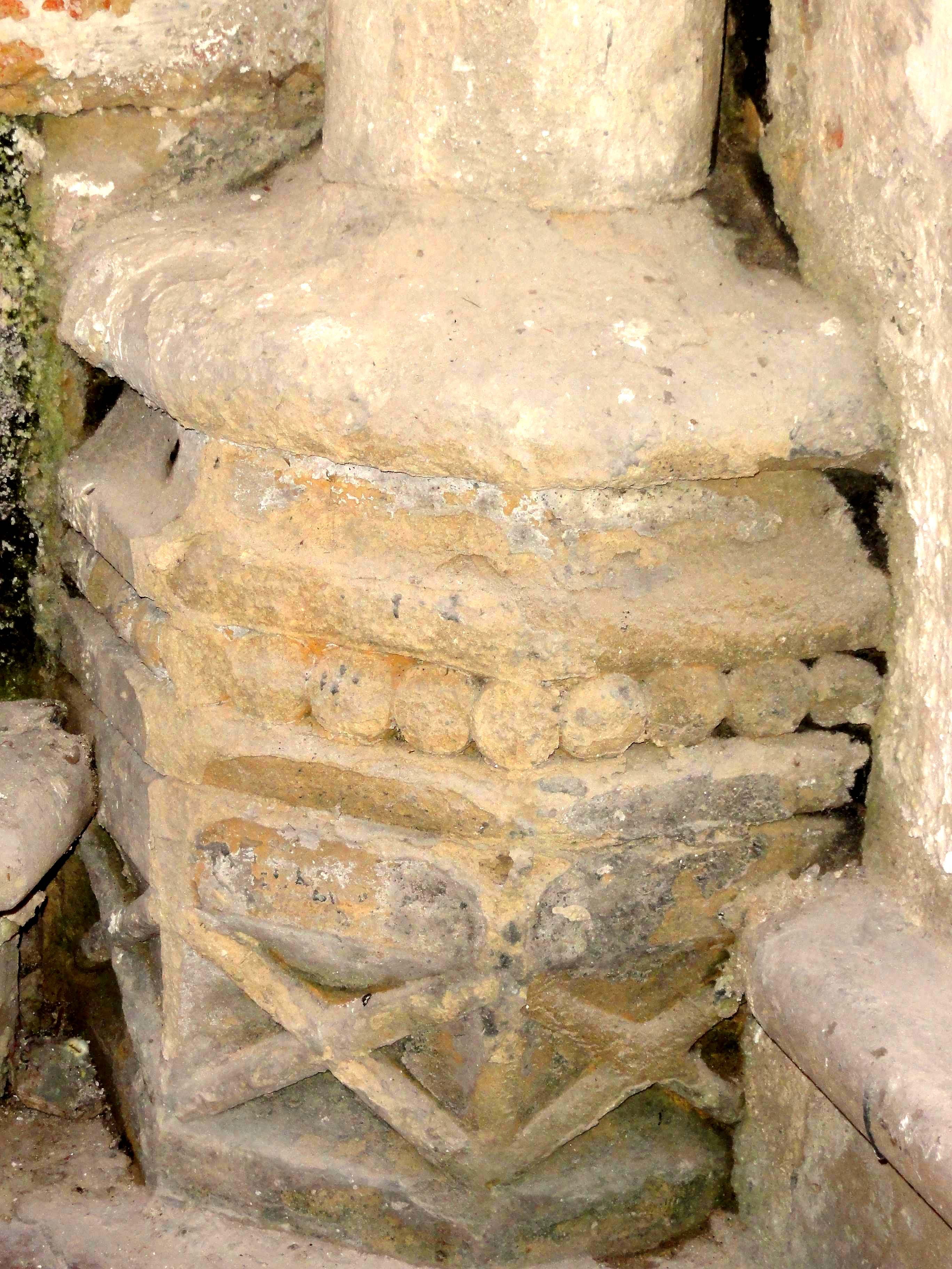 Intérieur de la chapelle - voir titre.